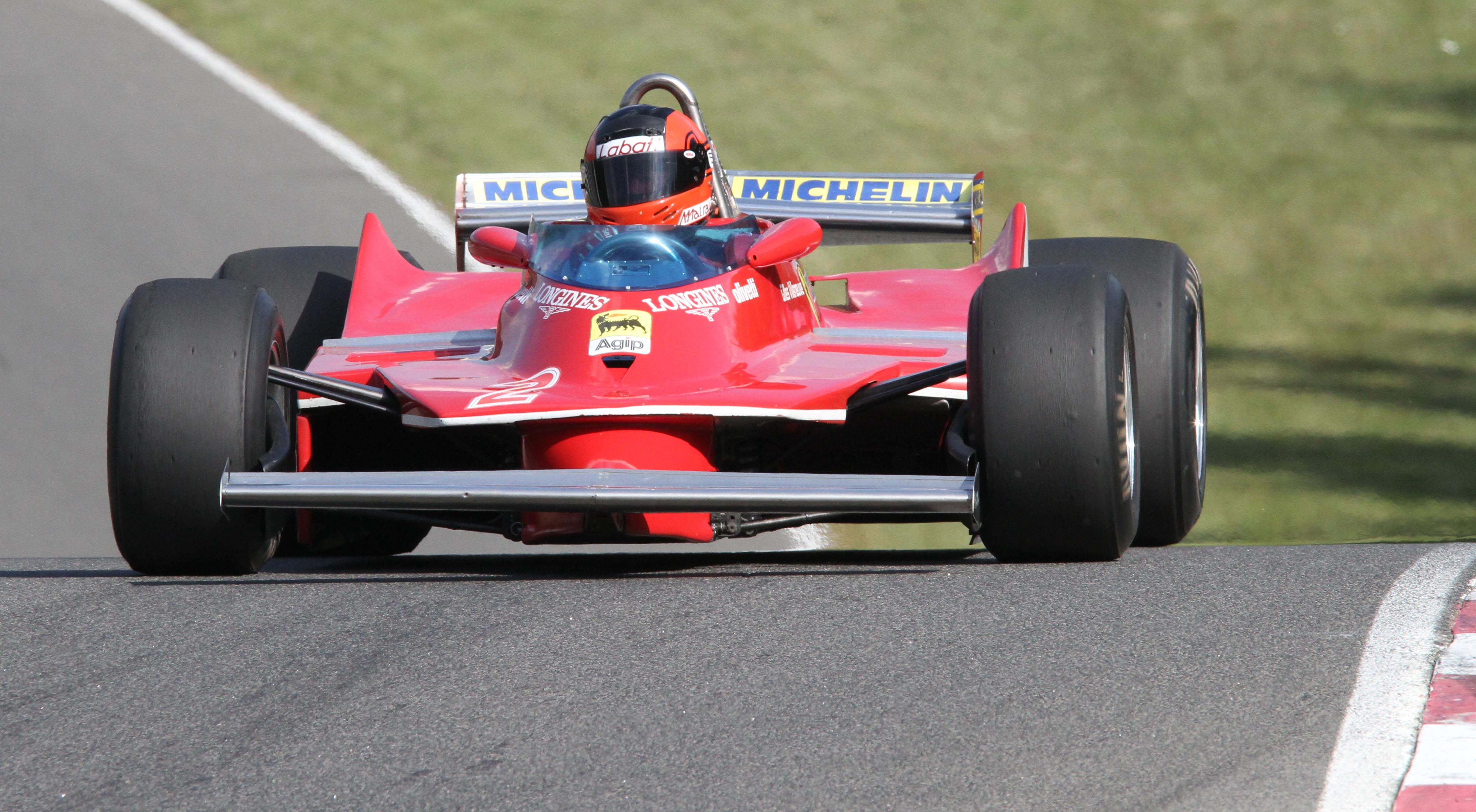 Gilles Villeneuves` Ferrari 312T5 at Mont Tremblant 2010